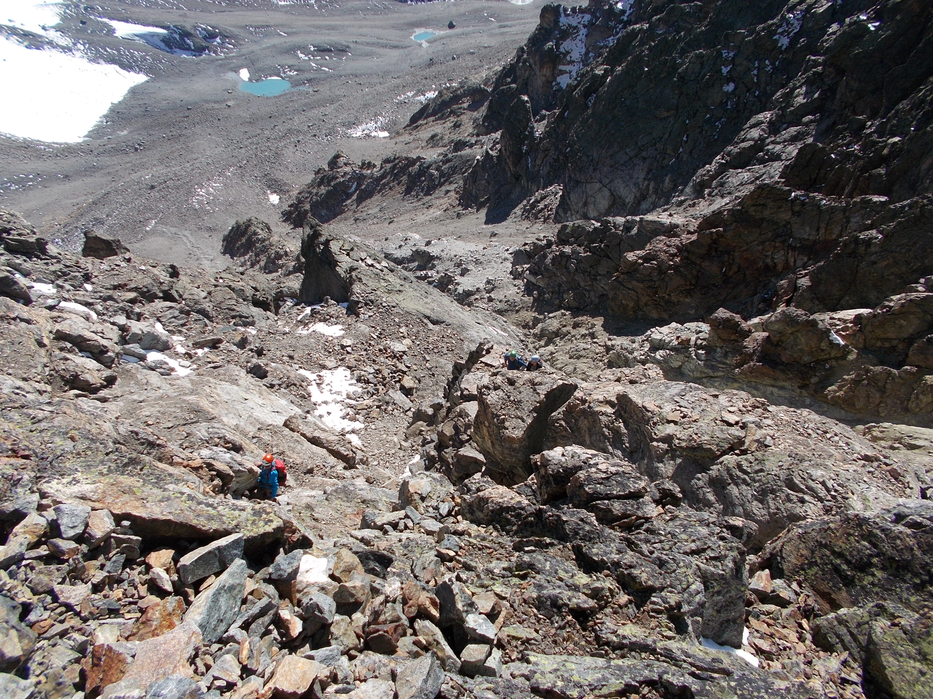 Blick in die ausgeaperte Weilenmannrinne auf den Südgipfel des Fluchthorns.